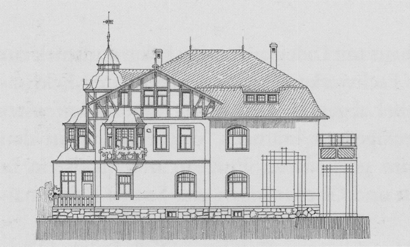 Radebeul, Villa Selma, Bauzeichnung Seitenansicht 1910